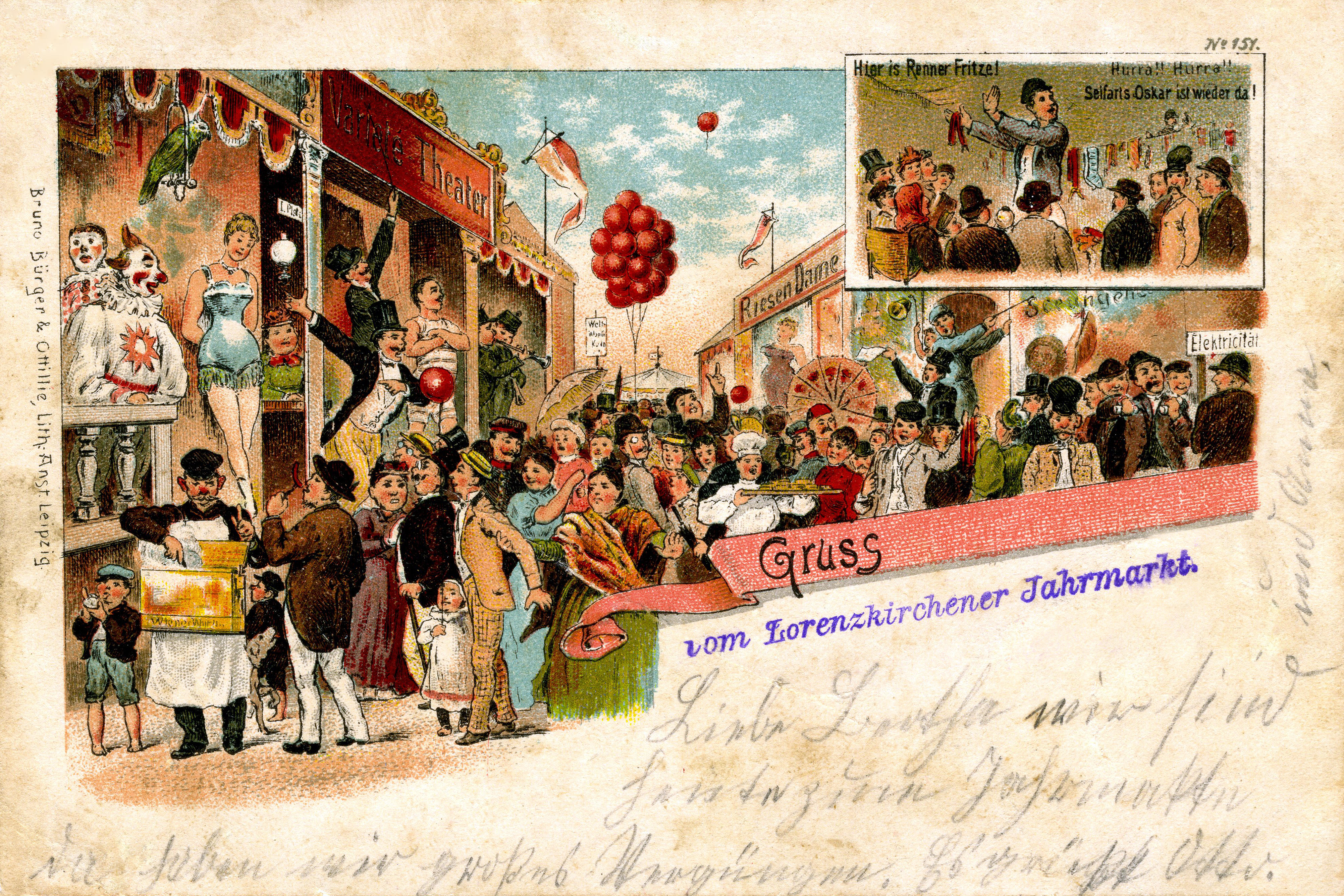 Jahrmarkt im Jahr 1900 beim Lorenzmarkt in Lorenzkirch, Sachsen, Deutschland. Vom 13. Jahrhundert bis zur Reformation blieb die Laurentiuskirche von Lorenzkirch eine Wallfahrtskirche, und der Laurentiusmarkt wurde anfangs jeweils am 10. August, dem Laurentiustag genannten Sterbetag des Laurentius von Rom, abgehalten. Der auf der Talsanddüne entstandene Ort Lorenzkirch hatte ab 1791 als Marktflecken mit seinen 1834 neu bestätigten Marktrechten eine große wirtschaftliche Bedeutung wegen des Lorenzmarktes, der Pferdezüchter, Viehzüchter, Händler und Handwerker aus weitem Umkreis anzog. In der Gegenwart wird der Lorenzmarkt als mehrtägiges Volksfest mit einem eintägigen Verkaufsmarkt begangen.